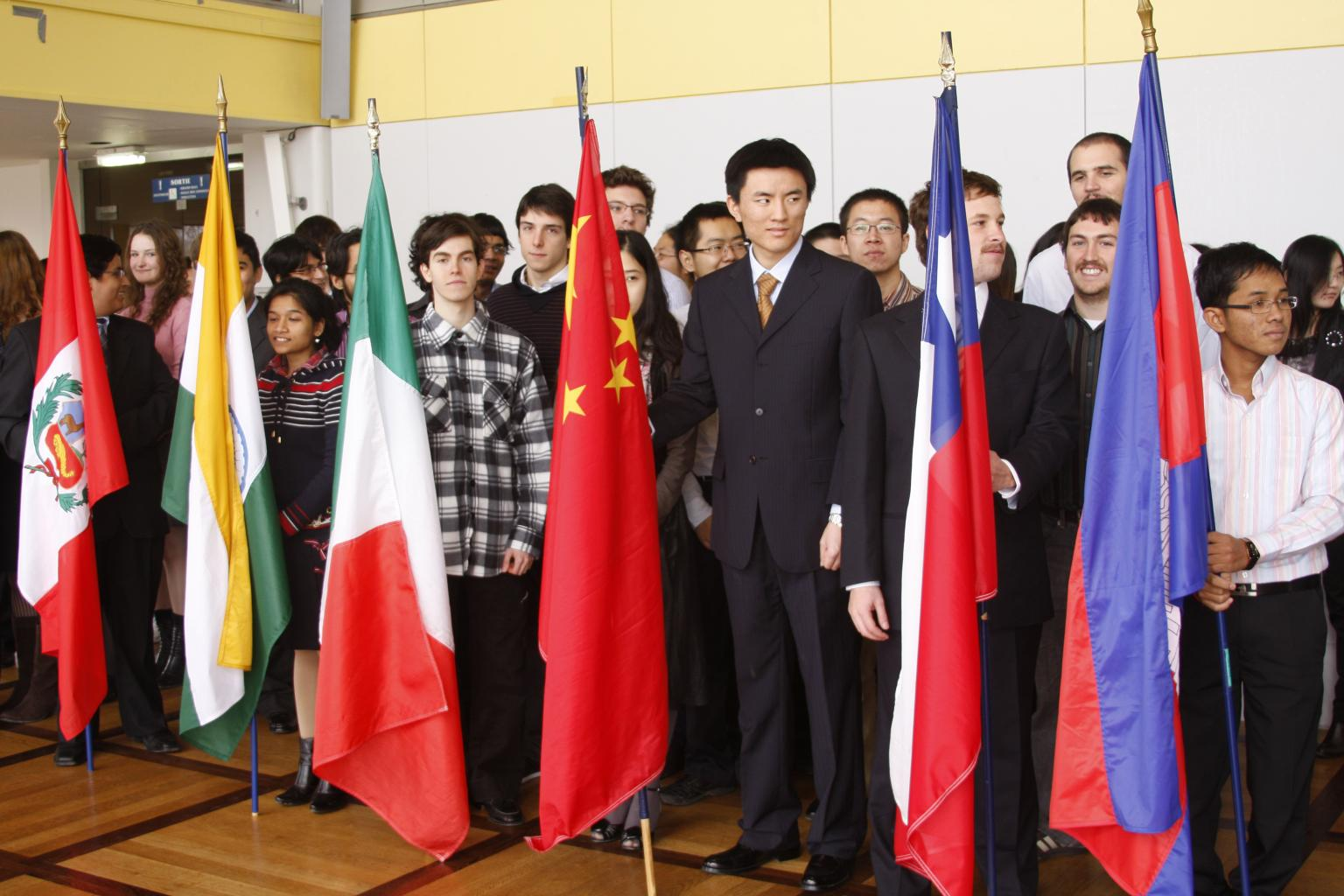 École polytechnique, étudiants internationaux X 2009.